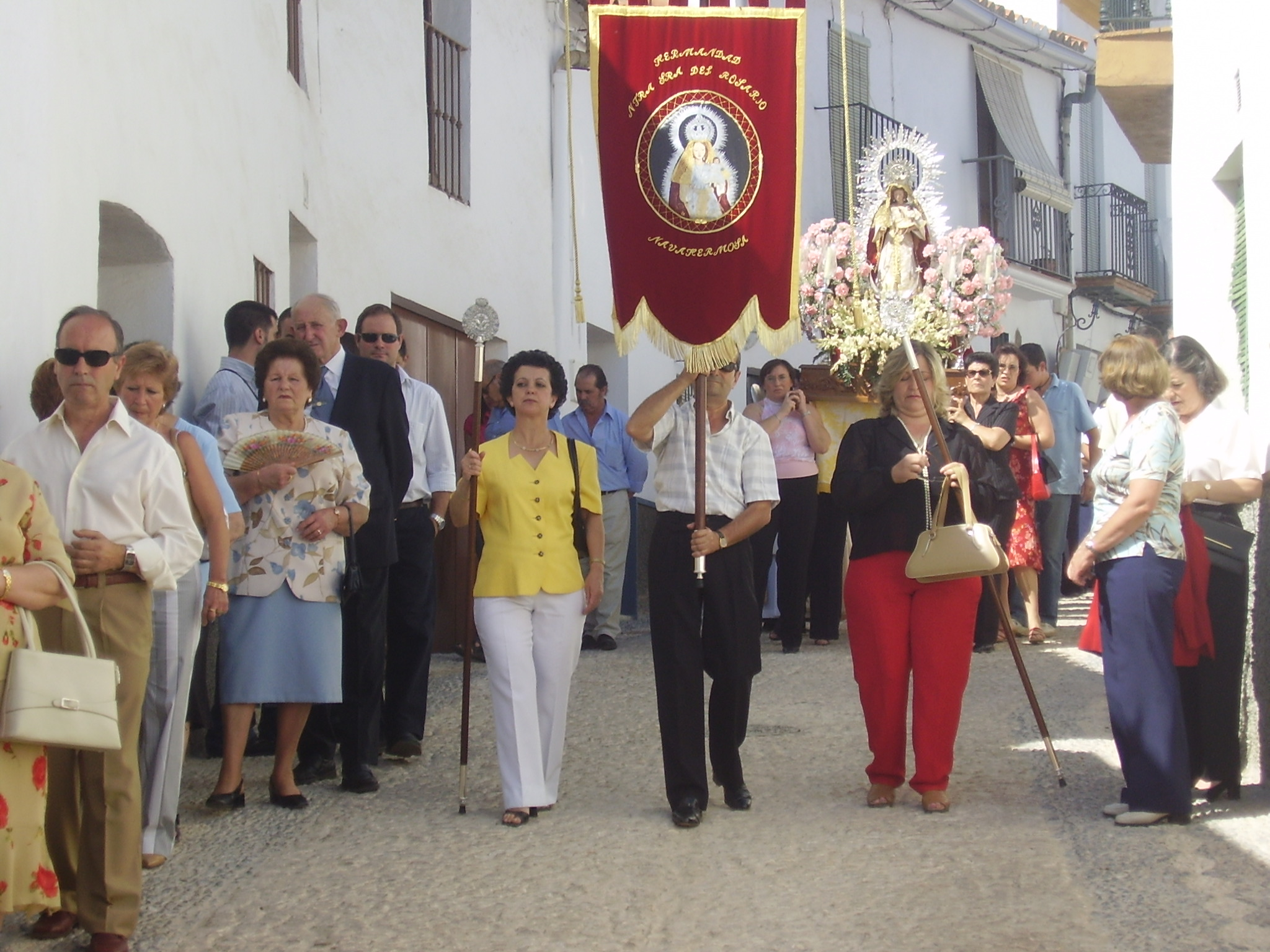 Procesión de la Virgen del Rosario por las calles de Navahermosa